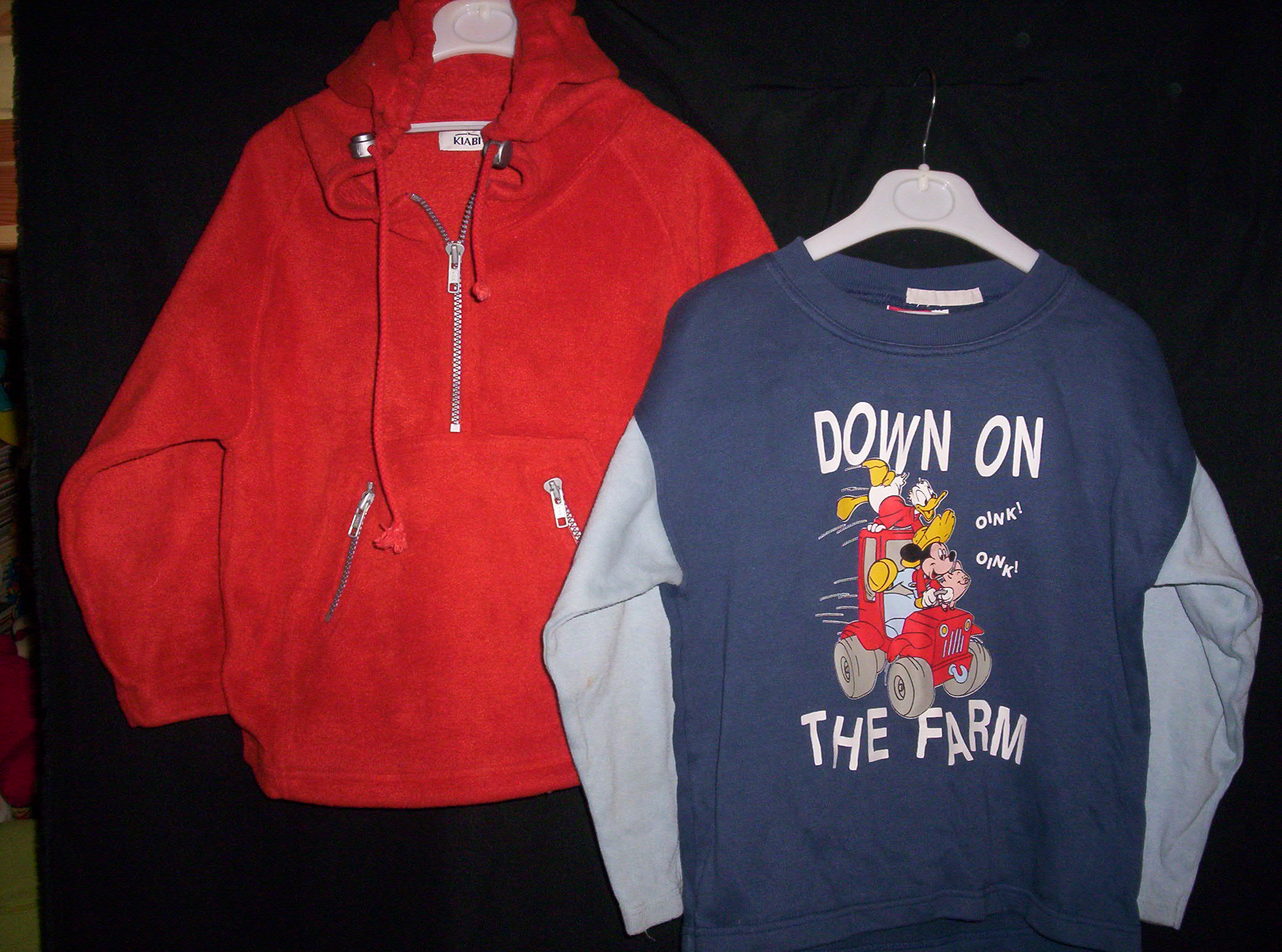 Sweat01.jpg